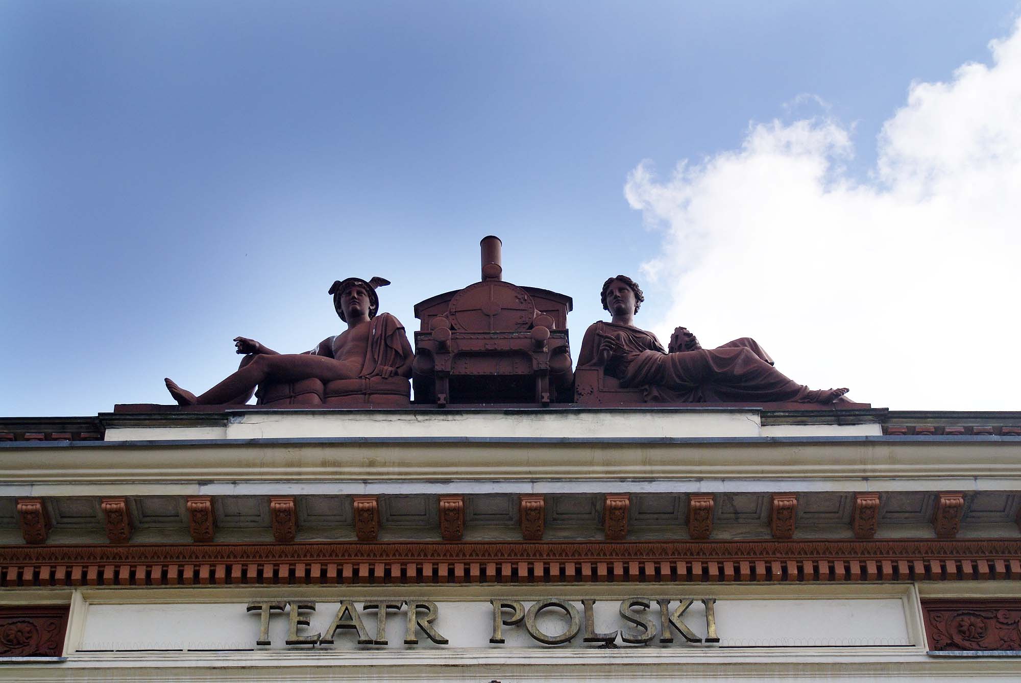 Wrocław, Dworzec Świebodzki, 1842, 1873